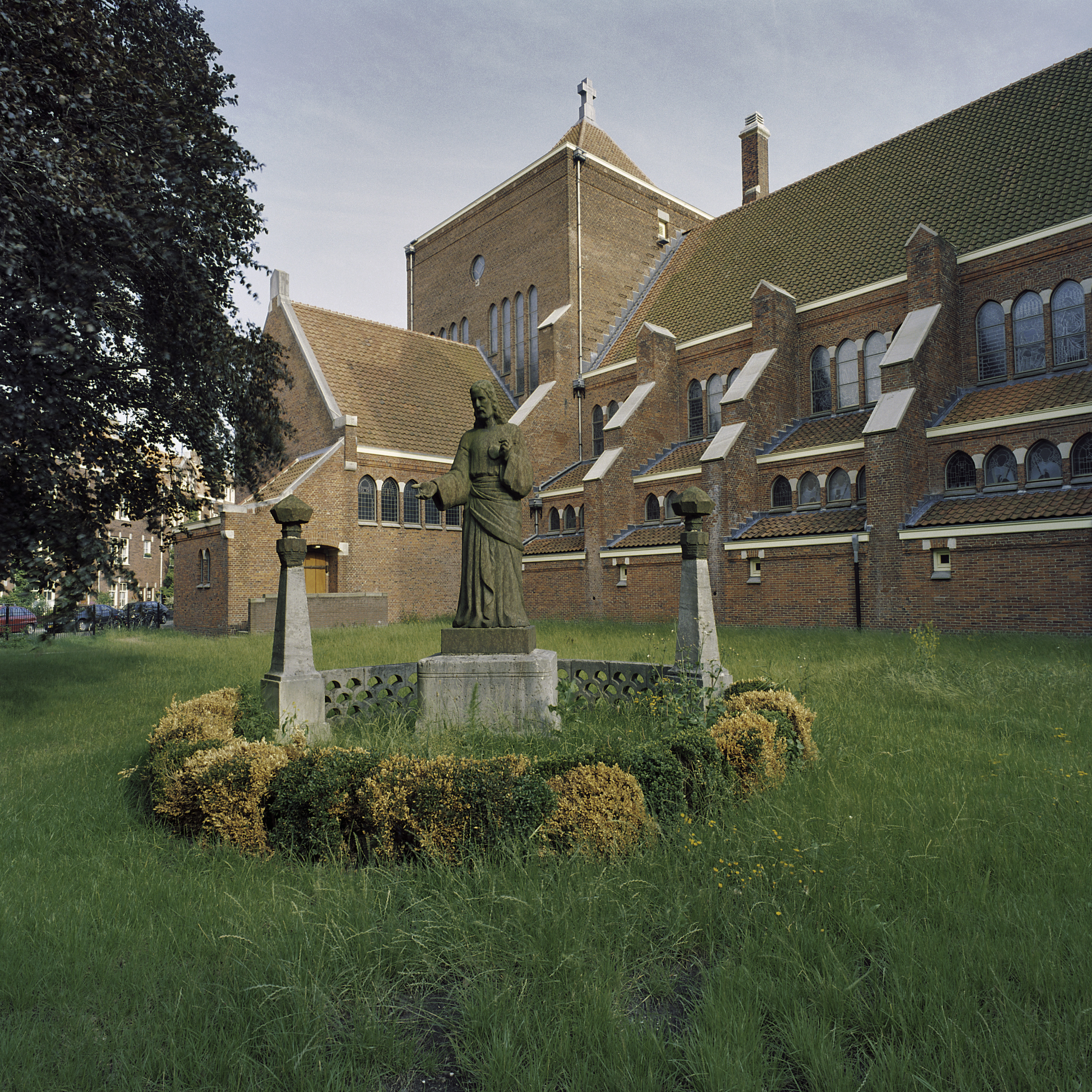 Rooms-katholieke kerk van de Heilige Martelaren van Gorcum: Overzicht noordgevel kerk (opmerking: Boek: "66 Kanjermonumenten")